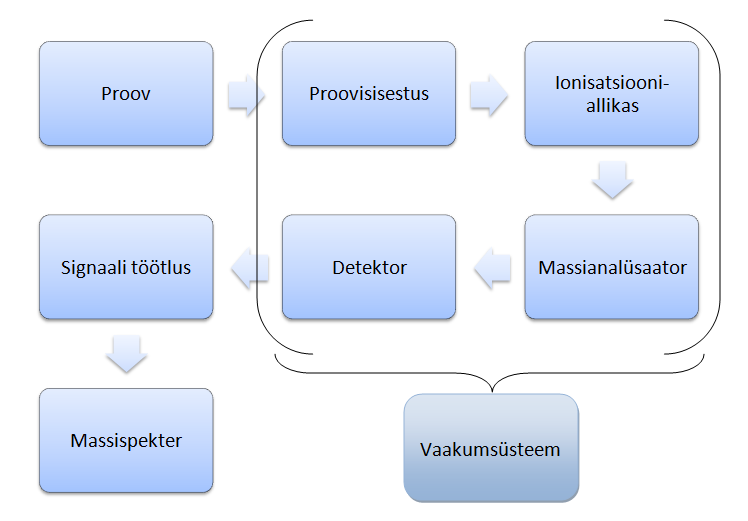 Skeem massispektromeetrilise seadme põhilistest osadest